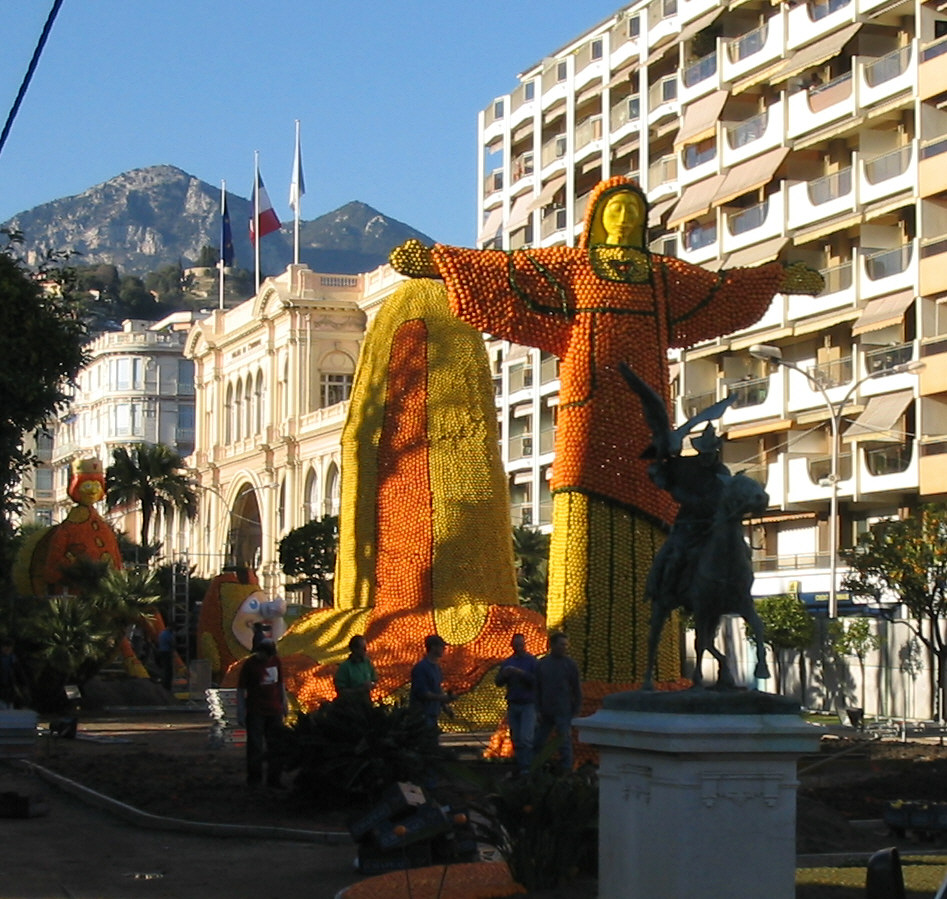 Préparatifs de la fête du Citron à Menton (Alpes-Maritmes). Je suis l'auteur du cliché pris en janvier 2006.